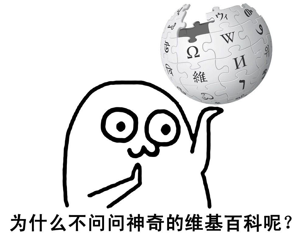 一个我自己做的维基百科表情包。